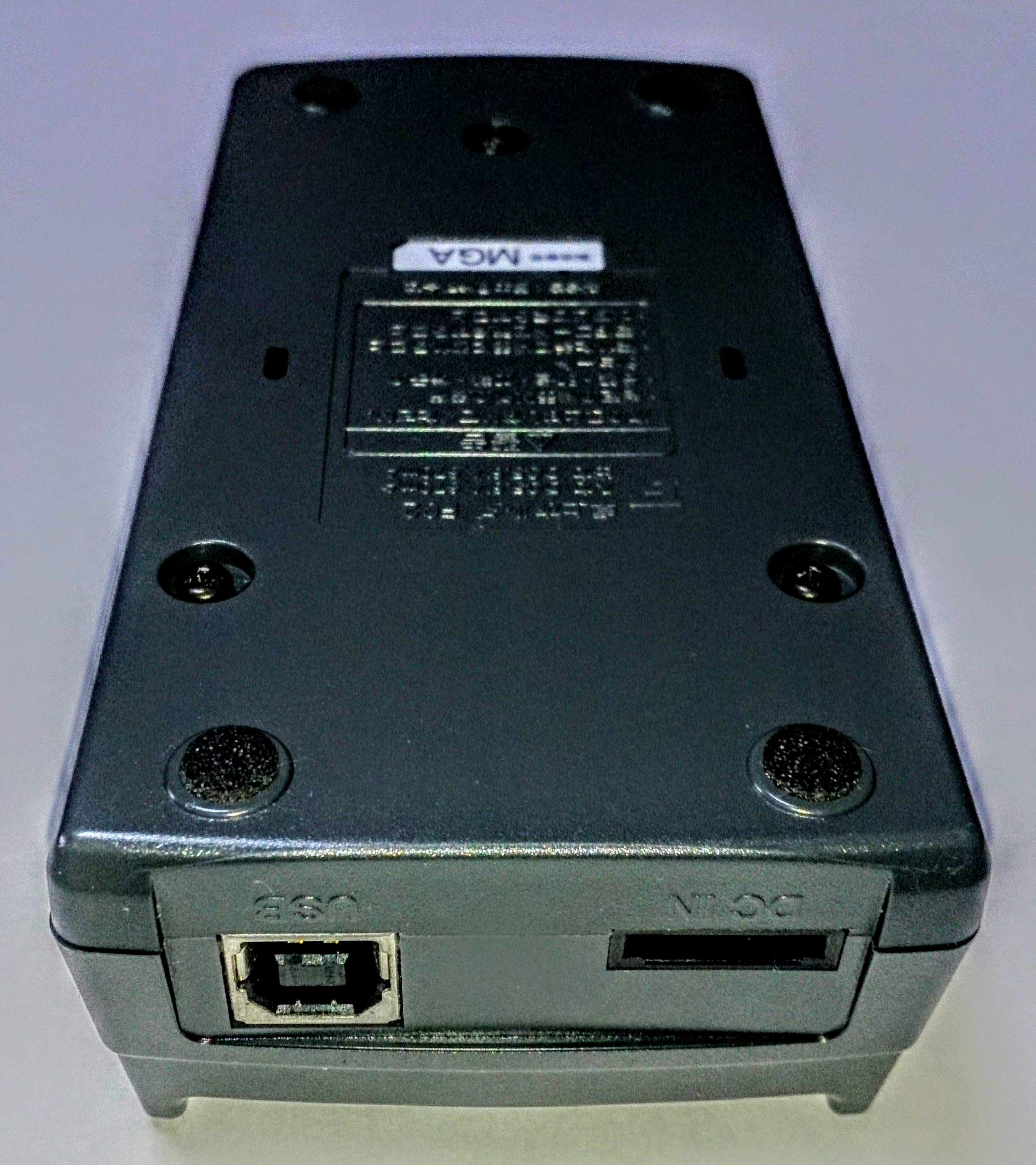 F2102V